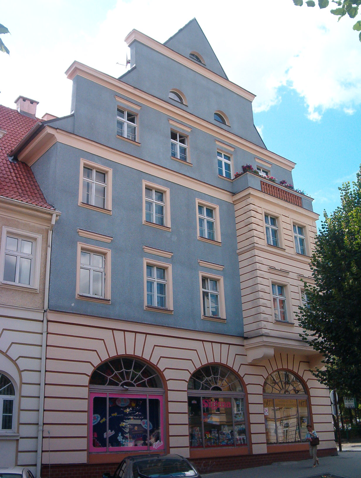 Lyck - Ełk. Kamienica w centrum